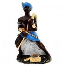 Orisha hijo de Oshún y Oshosi con características de hermafrodita atendiendo a que seis meses del año es de característica femenina y seis meses del año es de característica masculino. Cuando se presenta en su fase masculina habita en los bosques como su padre, cuando tiene características femeninas habita en los ríos o lagos de agua dulce y conserva los encantos de su madre.